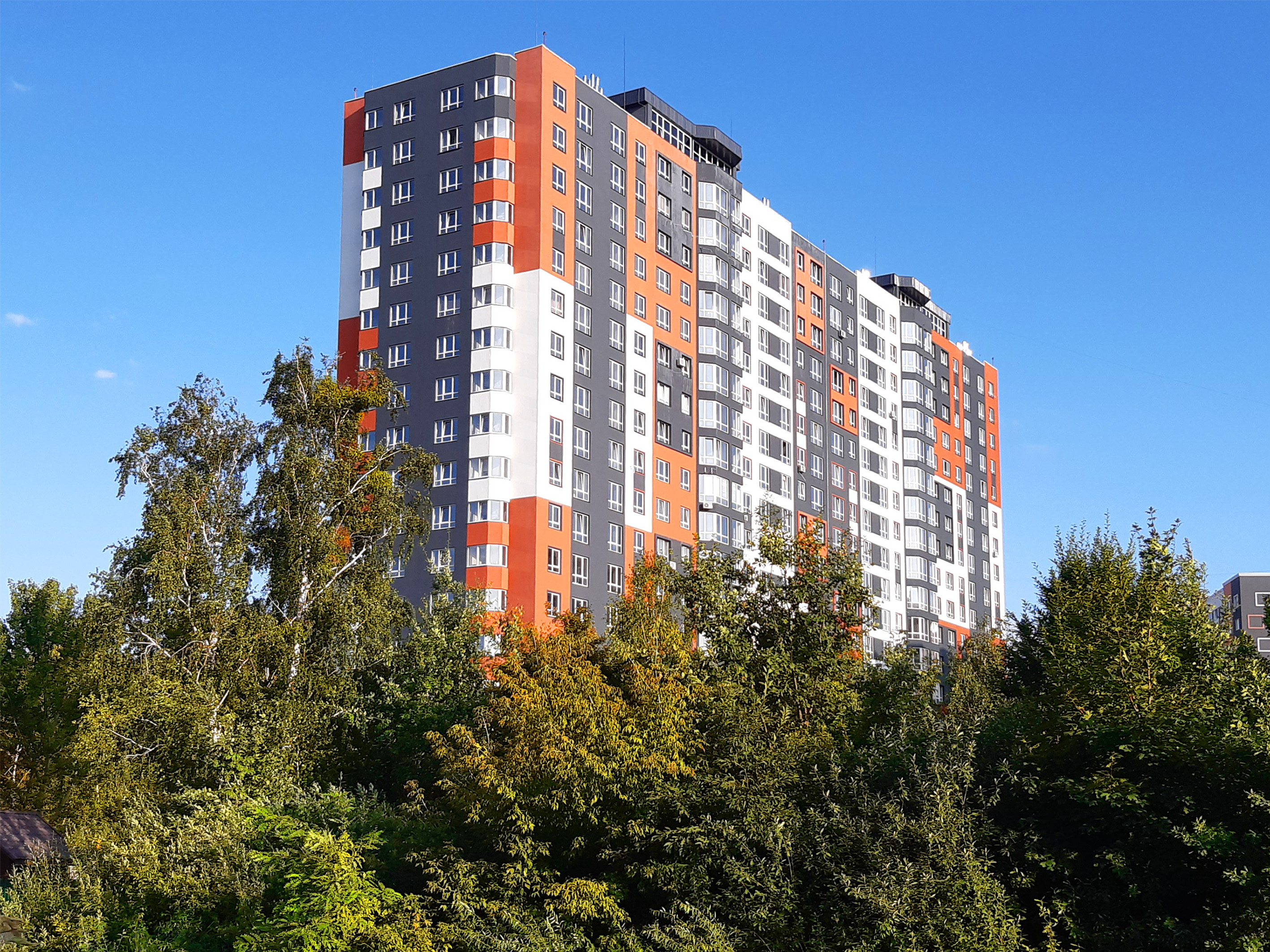 ЖК «Синергія 2 +», прозваний «Титаником». Урочище Пилипів Потік. Ірпінь